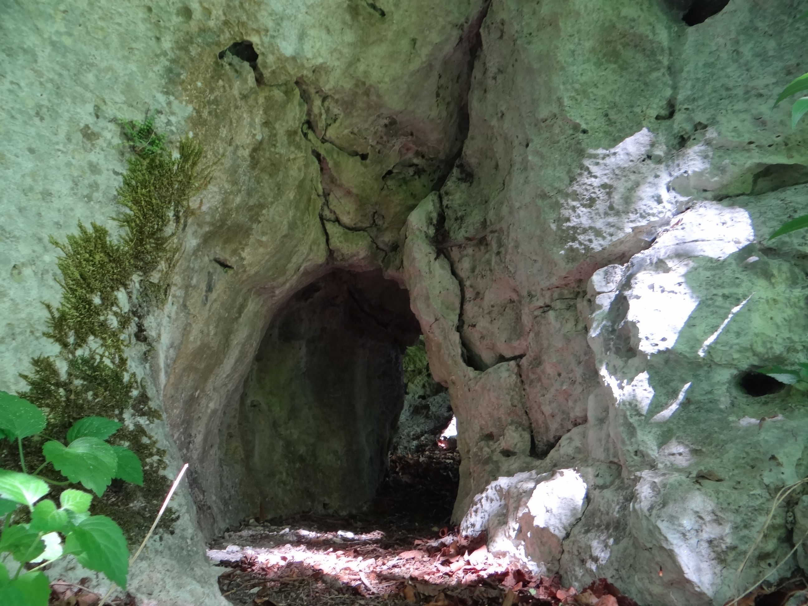 Rura w Skale Oczko